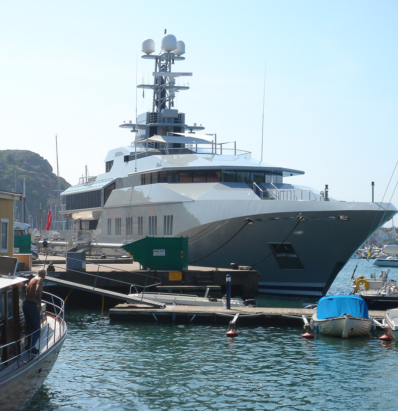 Megayacht Skat